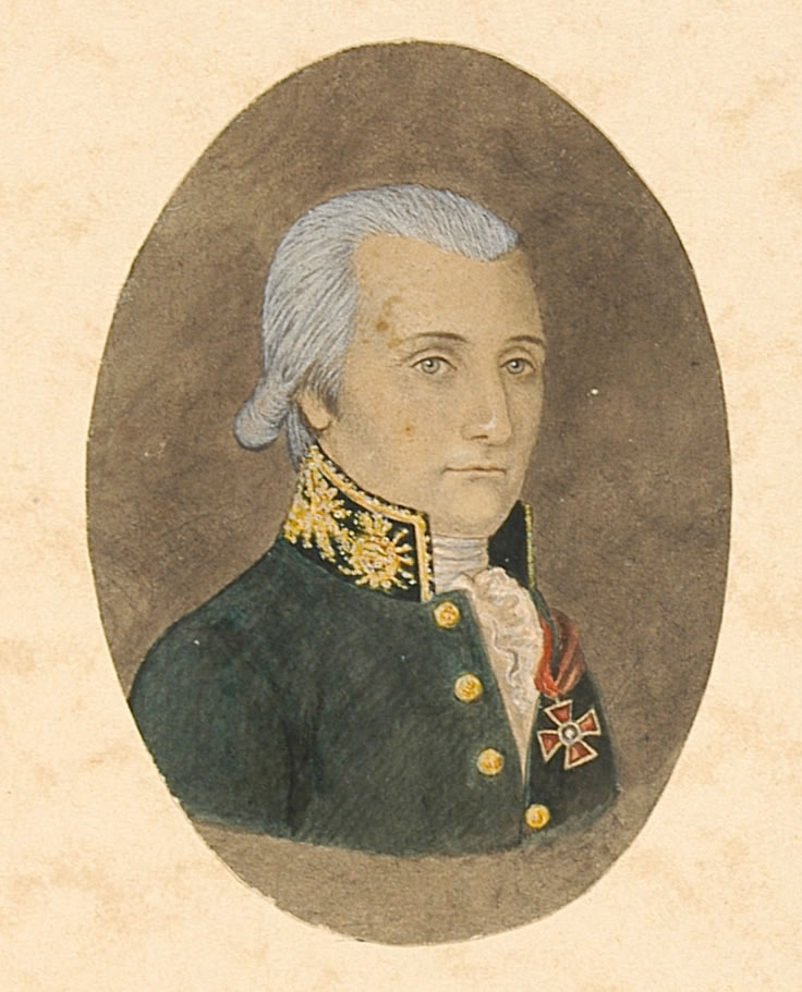 Ivan Osipovič Bierbrauer von Brennstein, Johann Jacob von Bierbrauer zu Brennstein Georgij Ivanovs Ururgroßvater mütterlicherseits